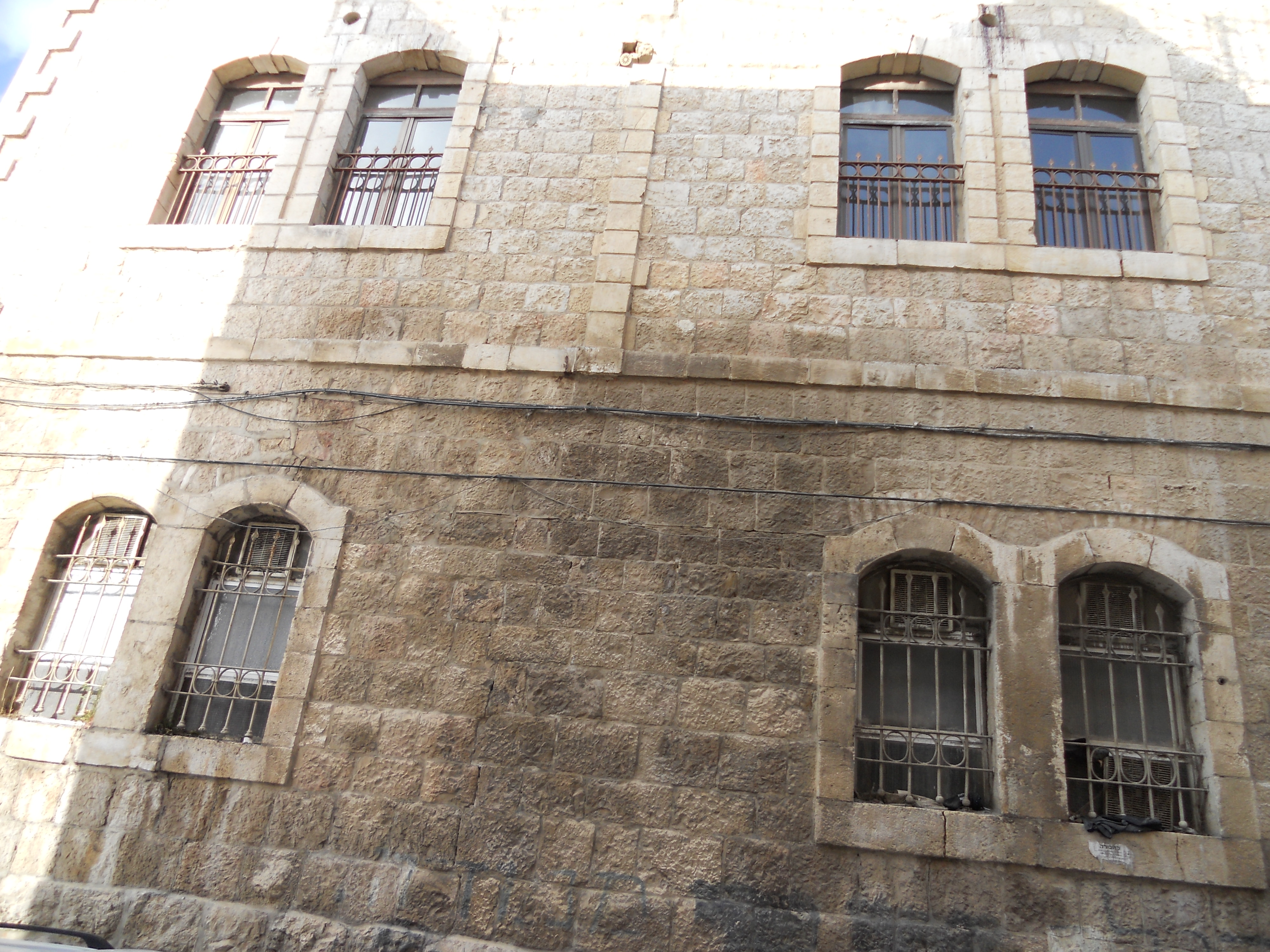 בית הכנסת "באר שבע" בשכונת בית ישראל בירושלים רחוב זוננפלד צולם: בניסן תשע"ב 2012